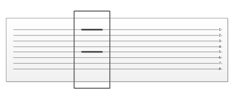 Esquema da leitura da fita magnética de um cartucho áudio